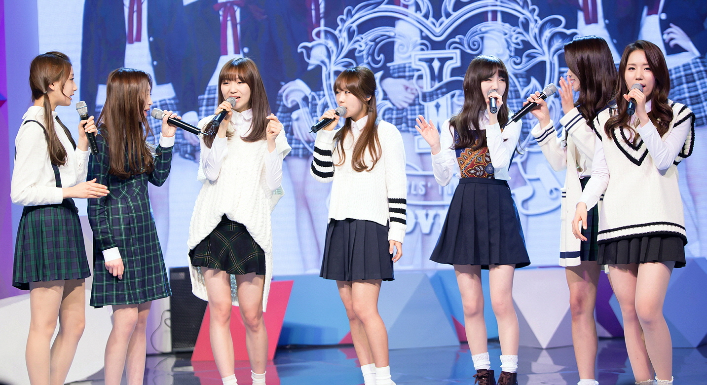 14.12.21 SAF 러블리즈 축하무대